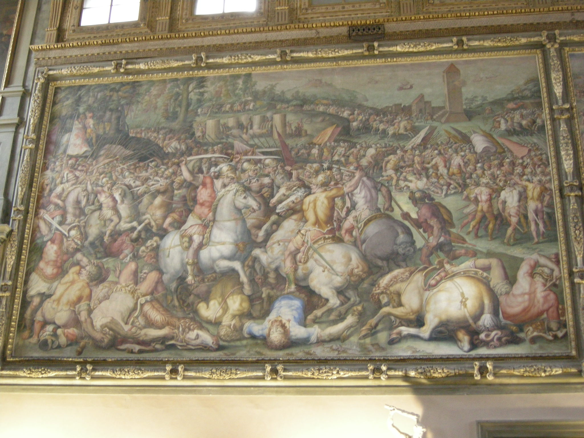 Giorgio vasari, La sconfitta dei pisani alla torre di San Vincenzo